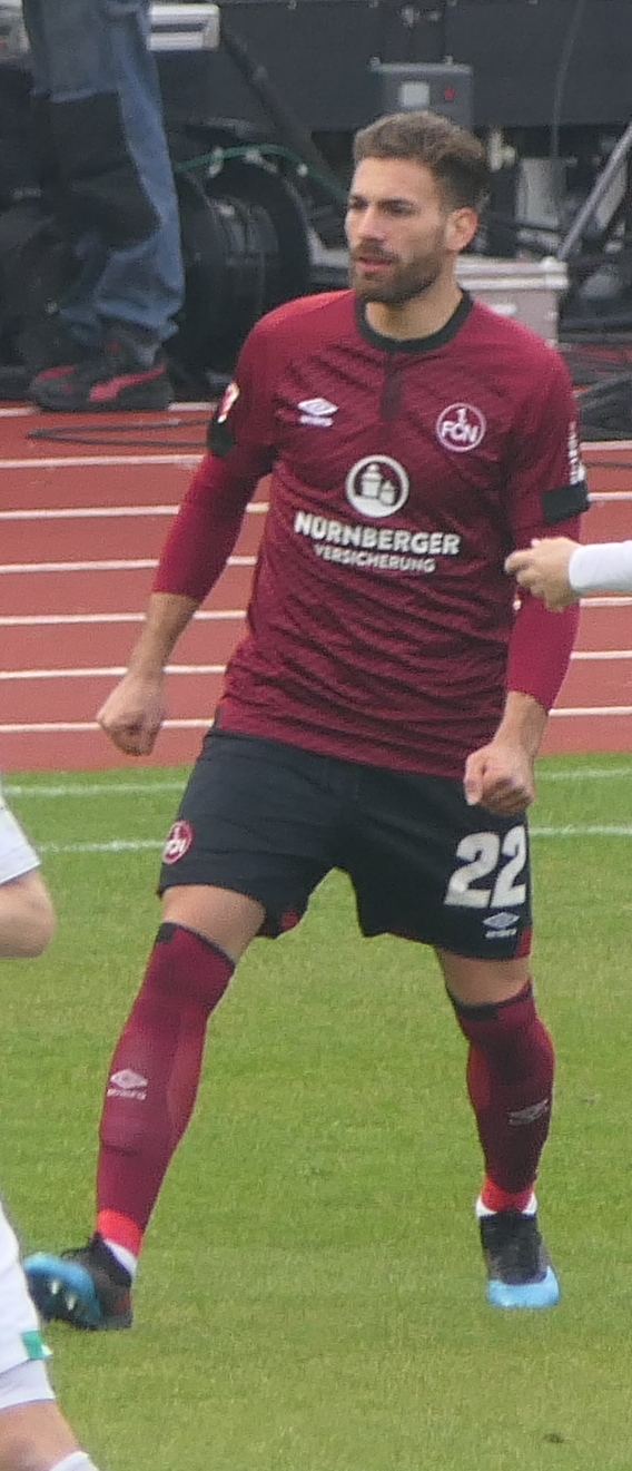 Der Fussballprofi Enrico Valentini vom 1.FC Nürnberg beim Heimspiel gegen Werder Bremen am 02.02.2019.